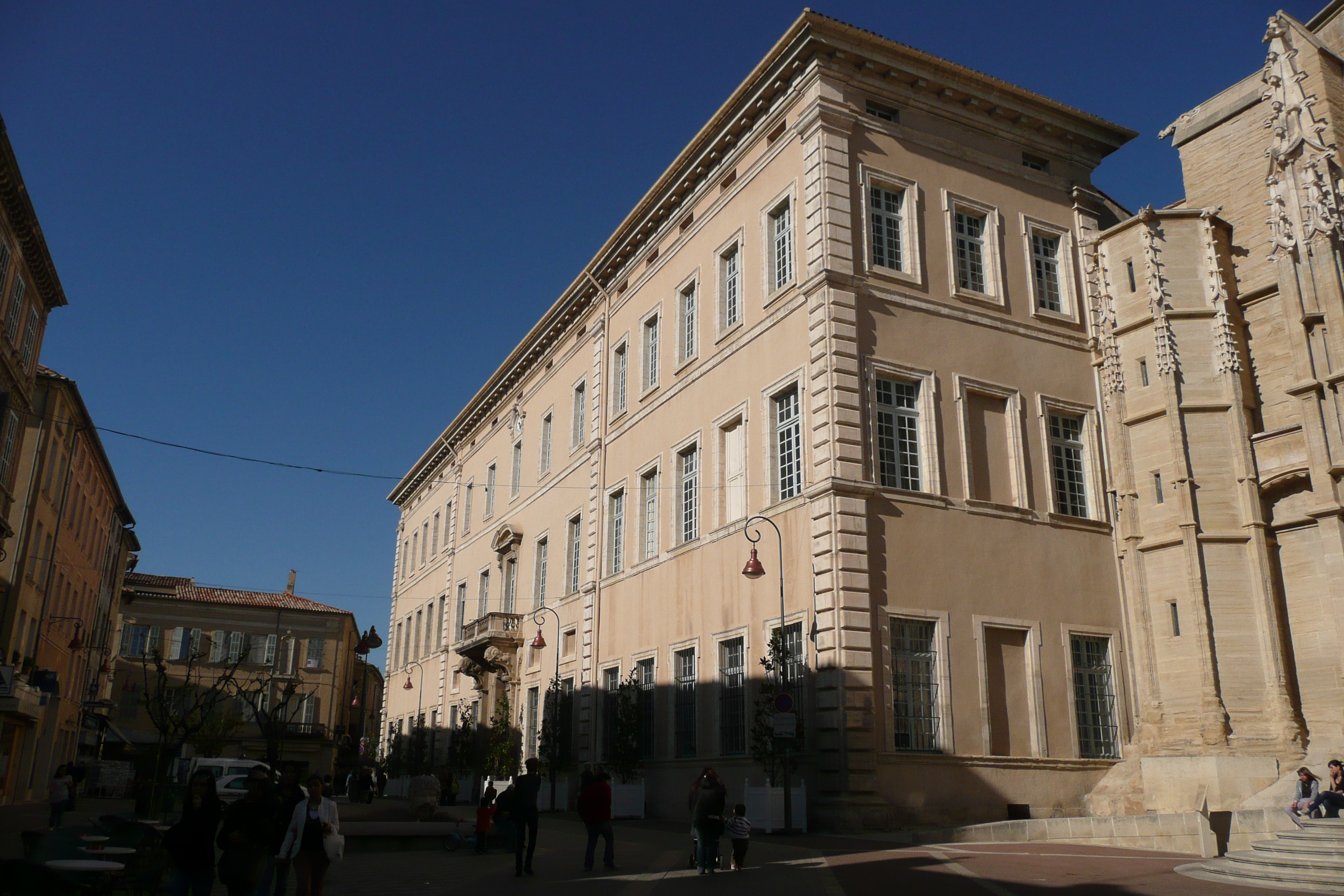 Tribunal d'Instance, à côté de la cathédrale à Carpentras.